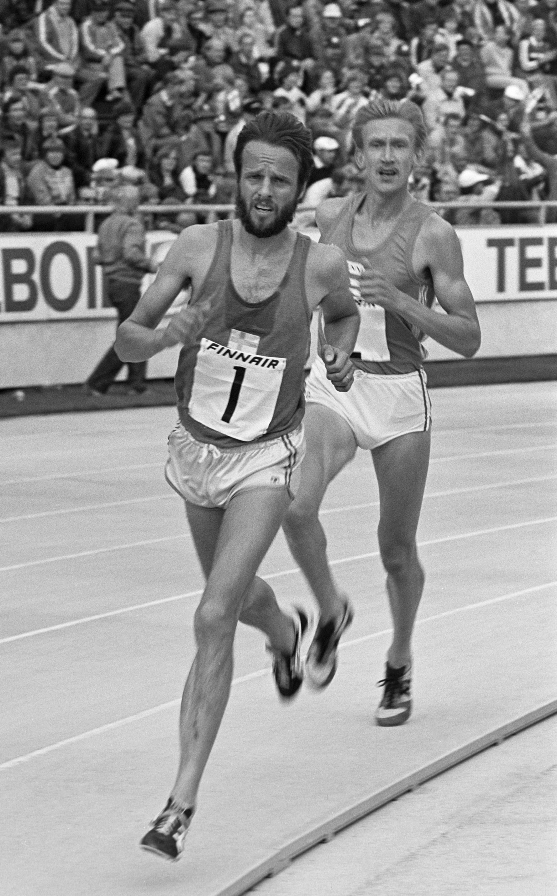 Suomi–Ruotsi-maaottelu Stadionilla. Lasse Virén johtaa.